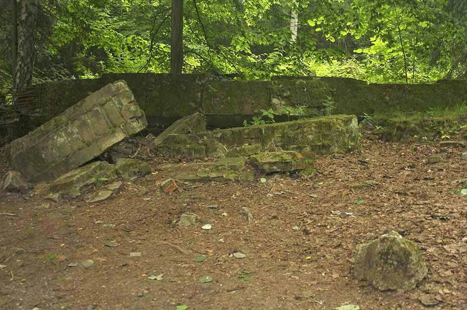 Überreste der Baracke in der Wolfsschanze, in der am 20. Juli 1944 das Stauffenberg-Attentat auf Hitler verübt wurde.